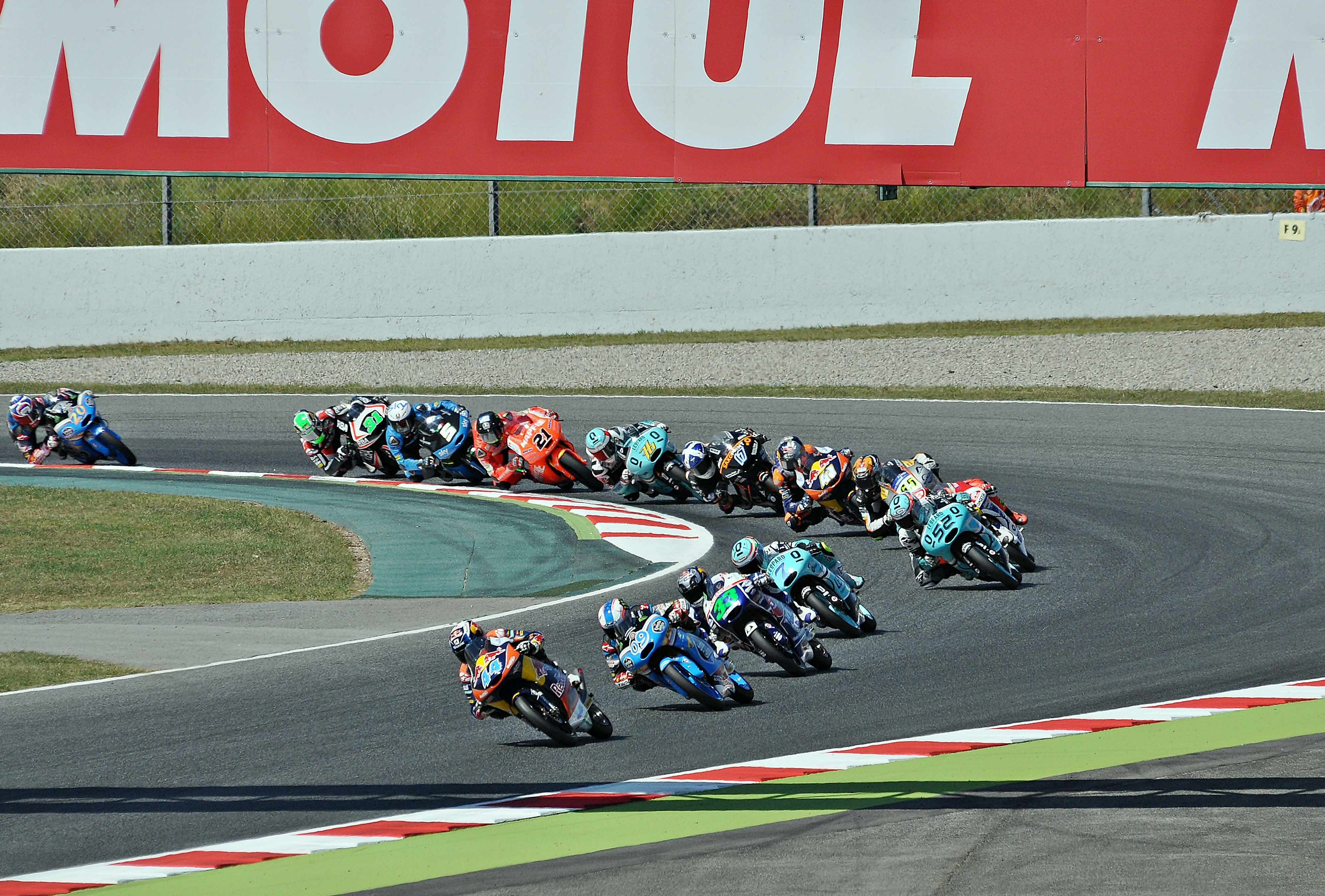 gran premio de cataluña